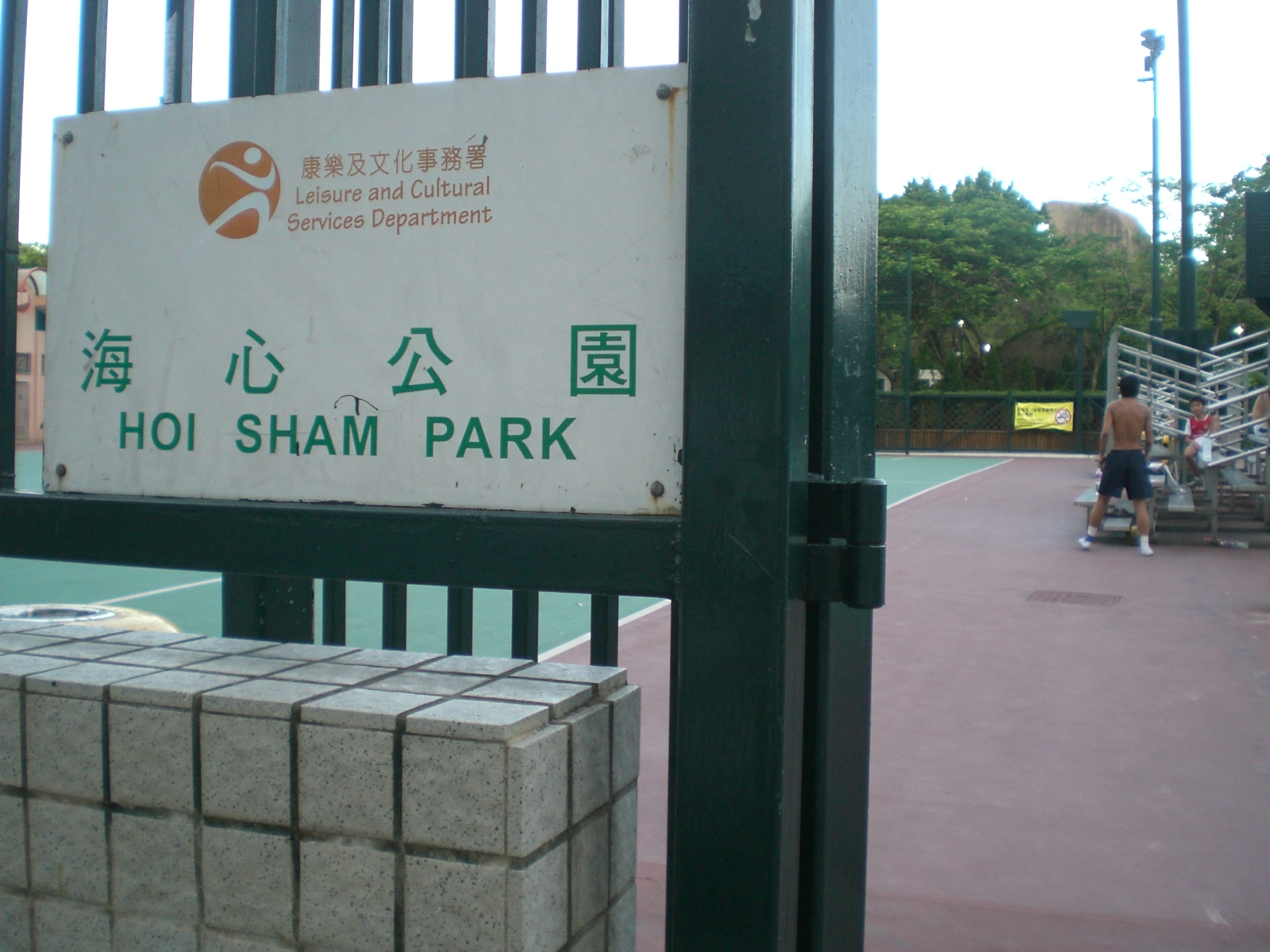 土瓜灣海心公園